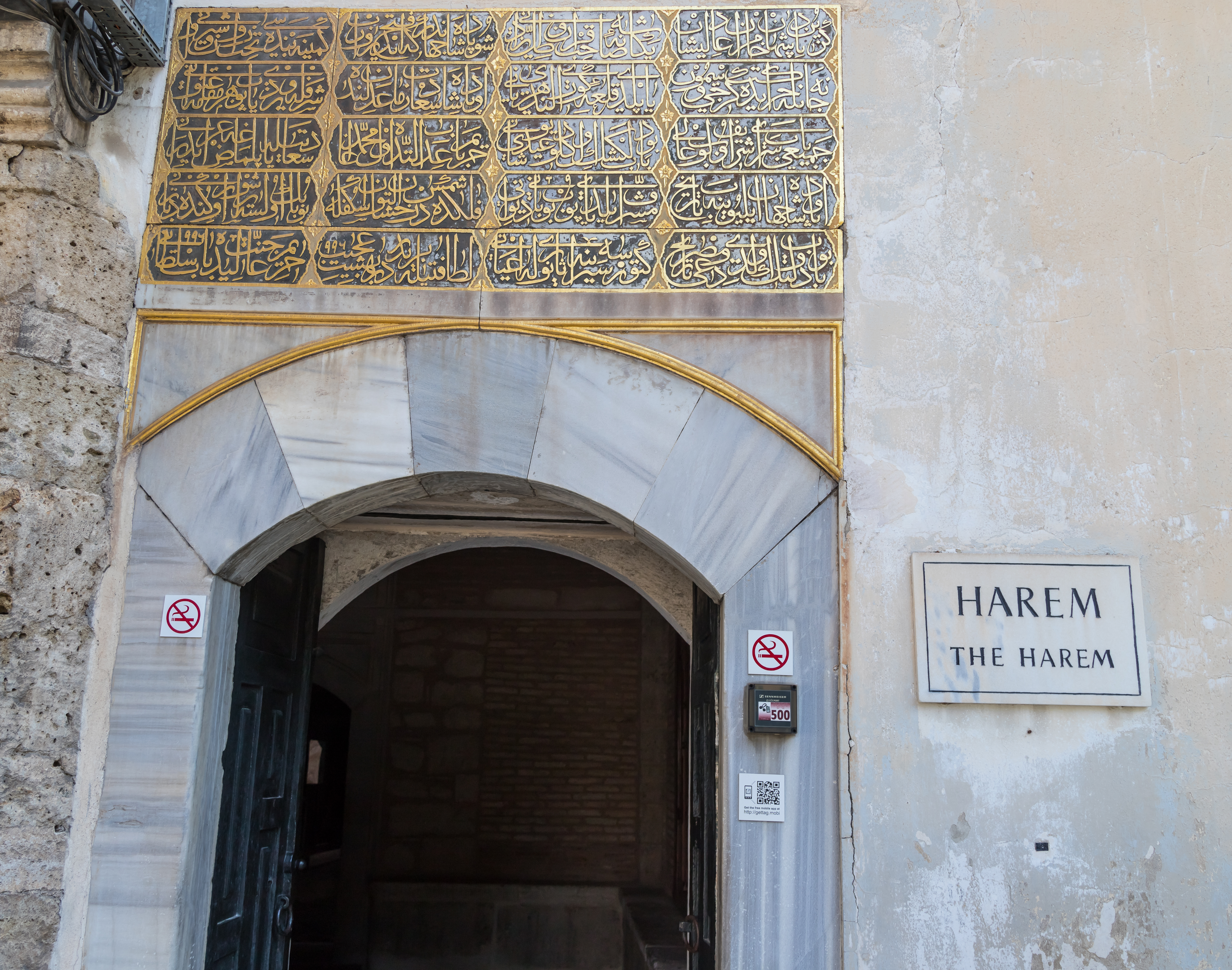 ingresso principale